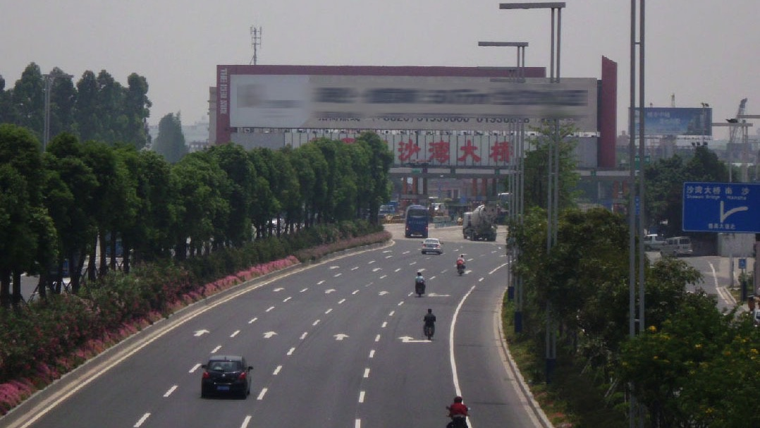 番禺沙湾大桥2012